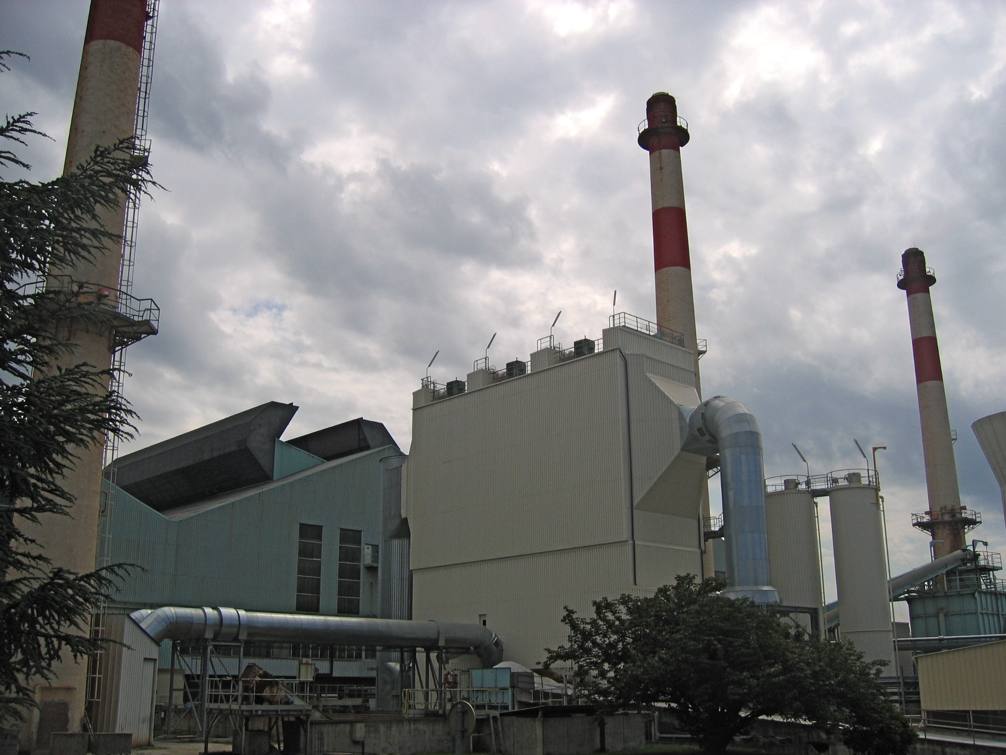 Verrerie Verallia Cognac du pôle Saint-Gobain Emballage (Compagnie Saint-Gobain) à Châteaubernard à proximité de Cognac, France.